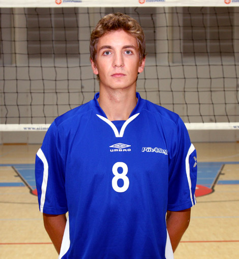 Finland volleyball player Ilari Sivonen